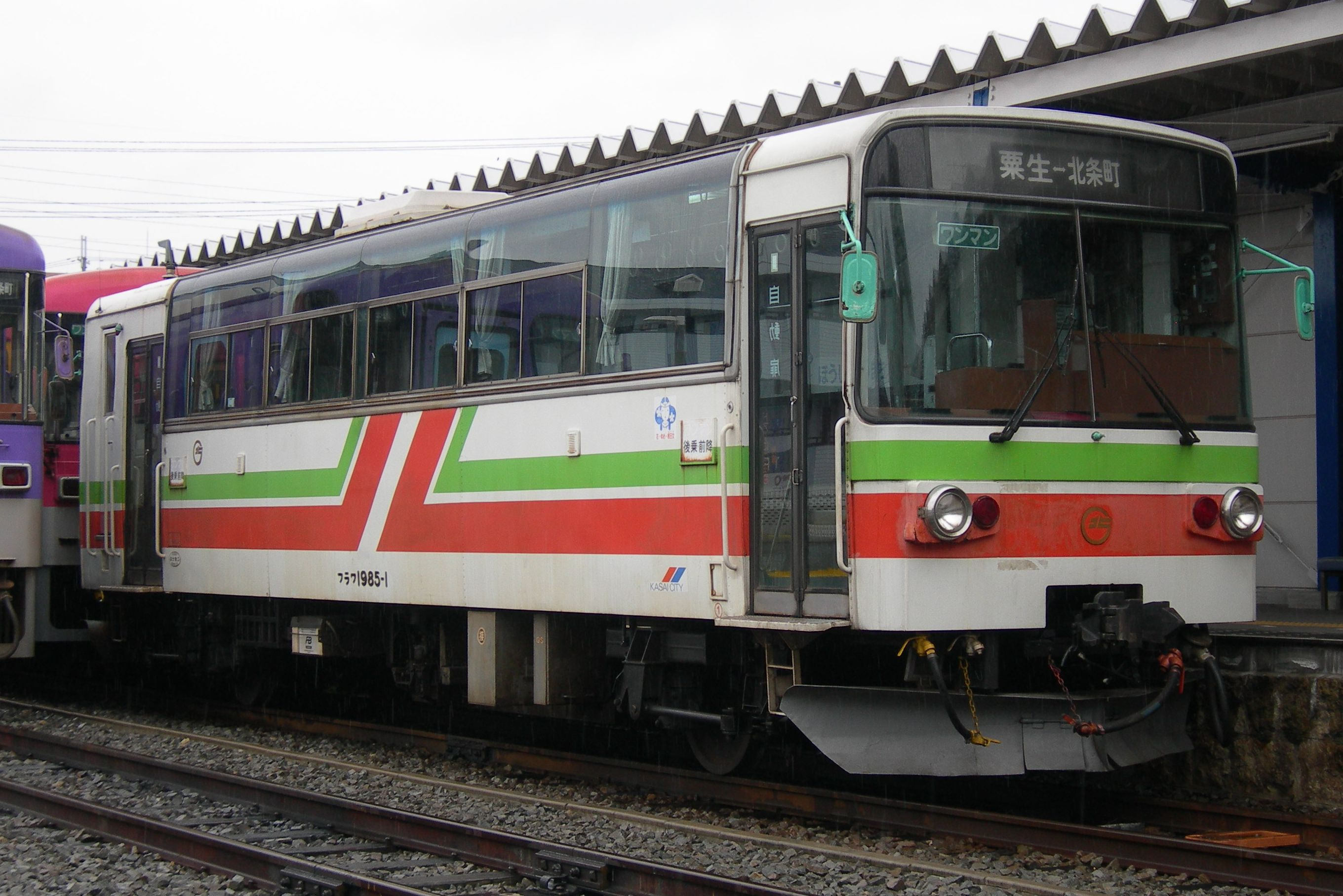 北条鉄道フラワ1985形気動車 （フラワ1985-1）